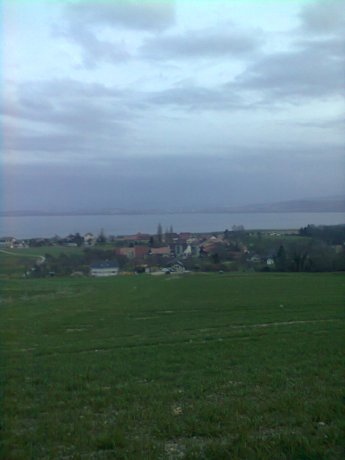 Fresens et lac Neuchâtel